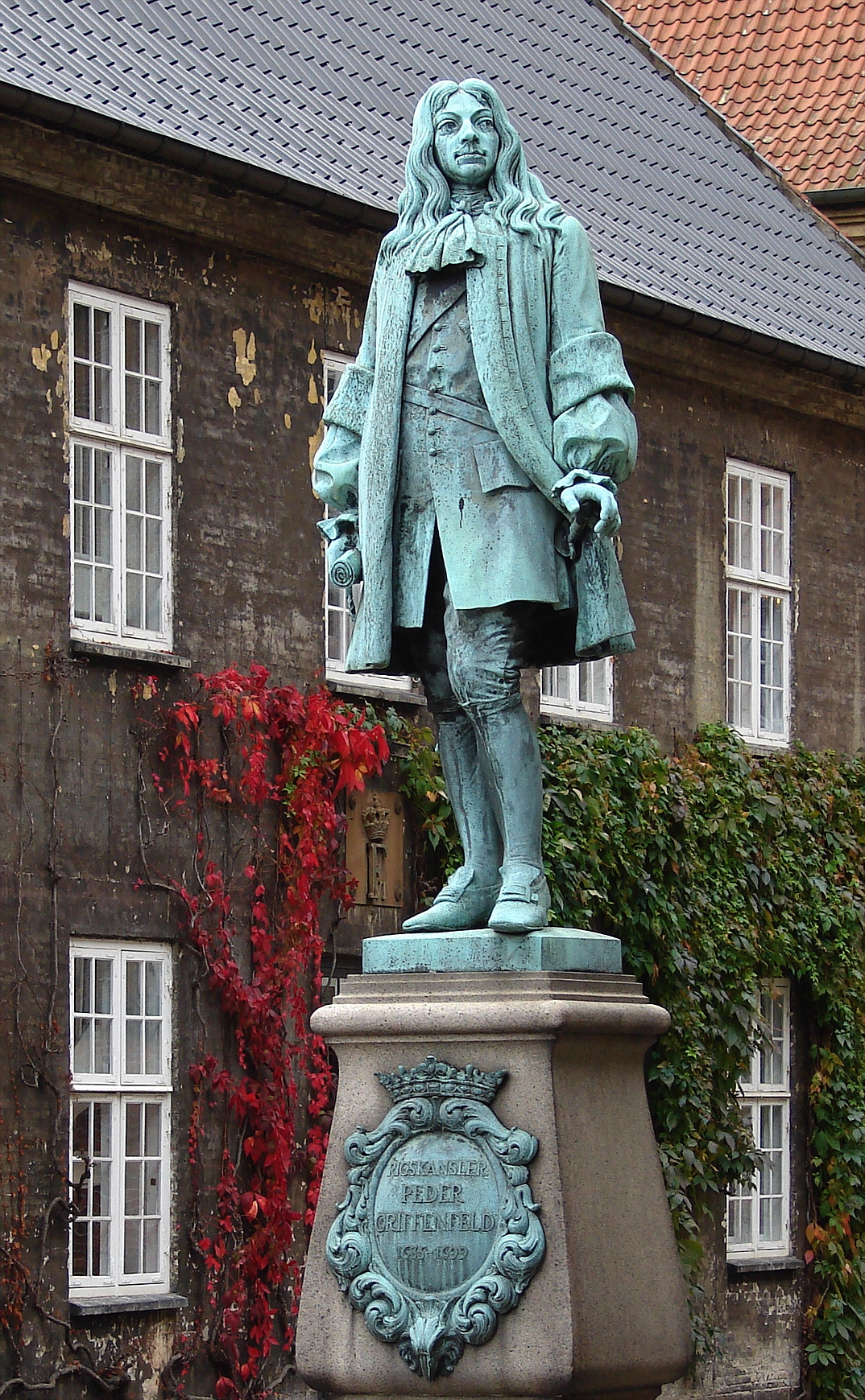 Peder Griffenfeld, Peder Schumacher Griffenfeld, Carl-Martin Hansen, 1922, Rigsarkivet, Bibliotekshaven, København